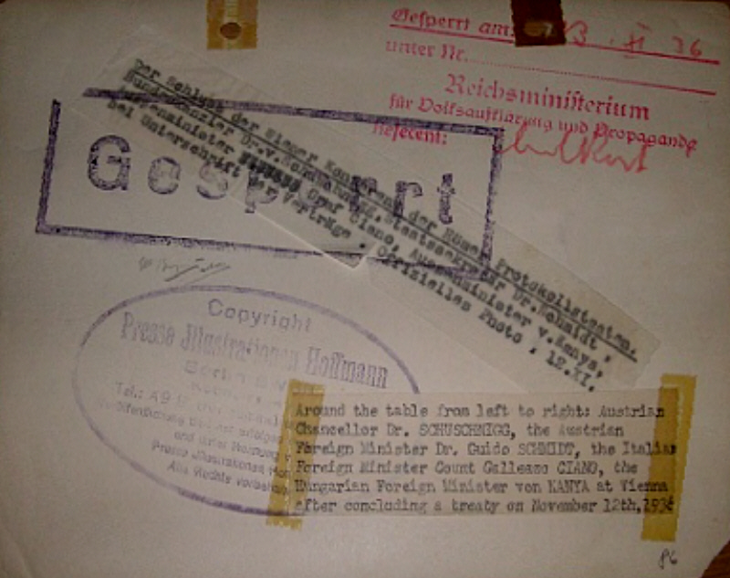 Sperrvermerk des RMVP für alle Presseberichte zur Wiener Dreierkonferenz am 12. November 1936 (Italien-Österreich-Ungarn)